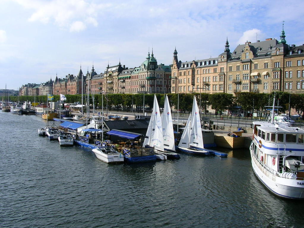 Stockholm Port